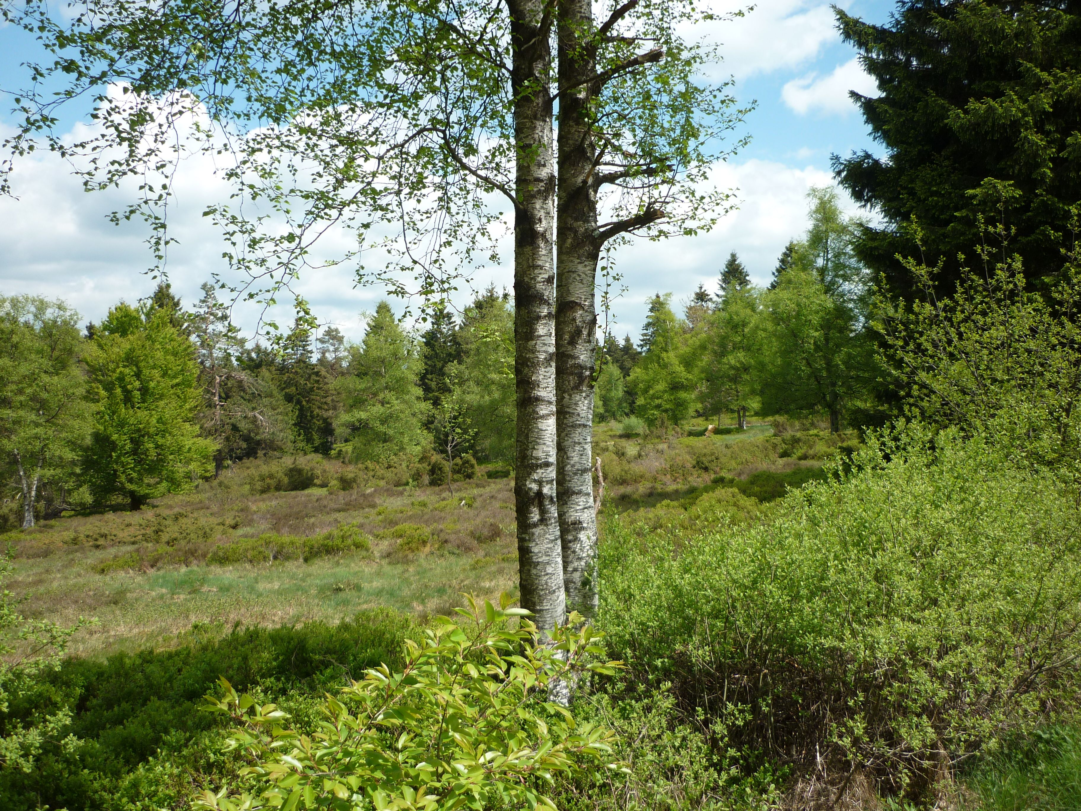 Naturschutzgebiet „Schwarzbachsystem mit Haberg und Krenkeltal“, Kirchhundem; Birken in der Bildmitte